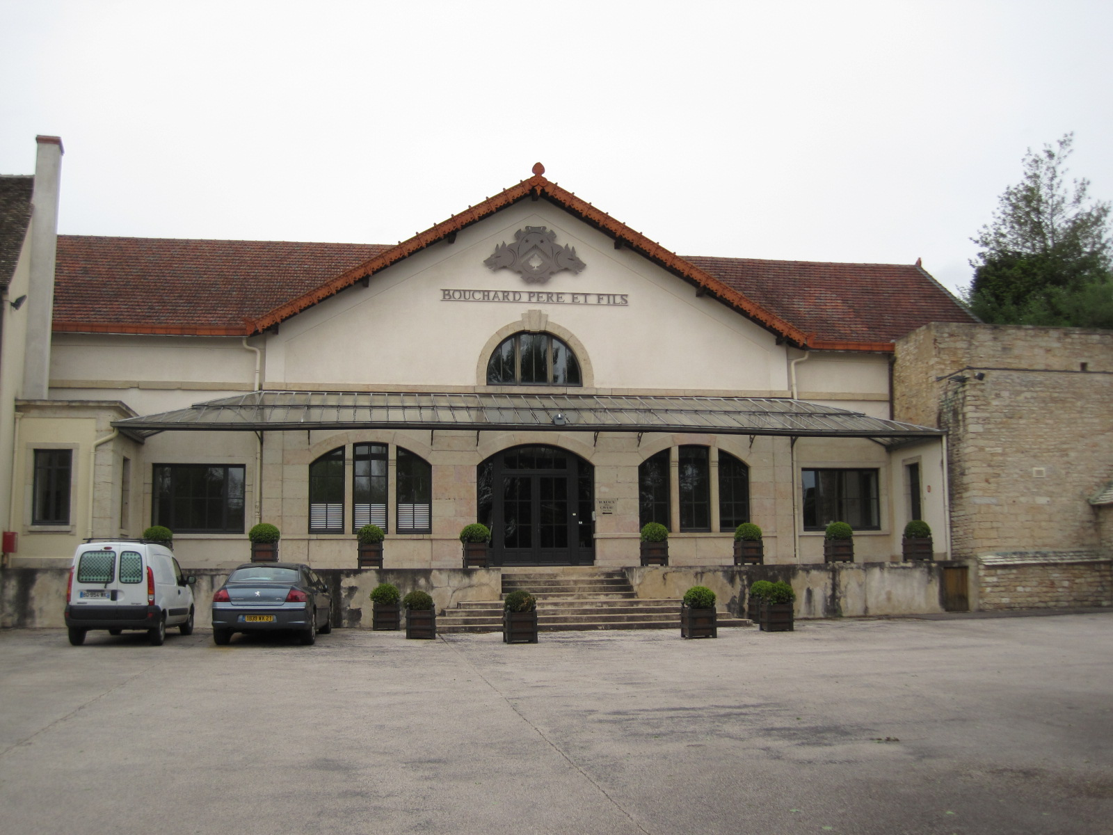 Bouchard Père & Fils